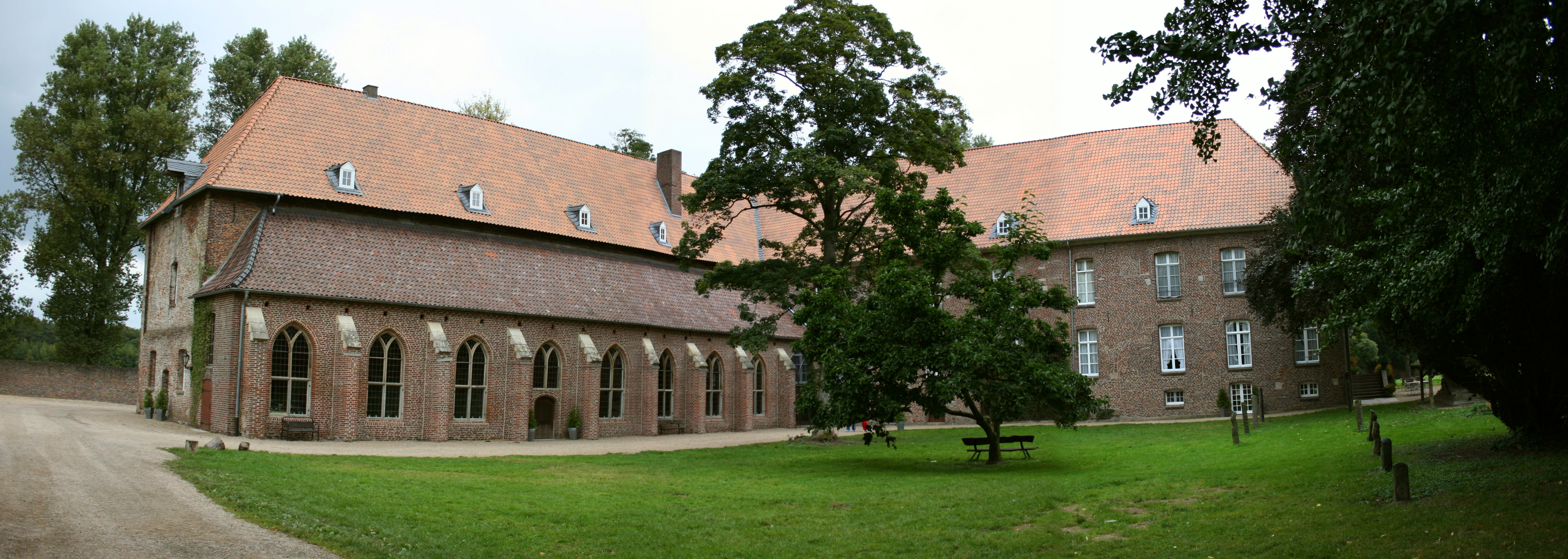 Kloster Graefenthal in Goch-Asperden